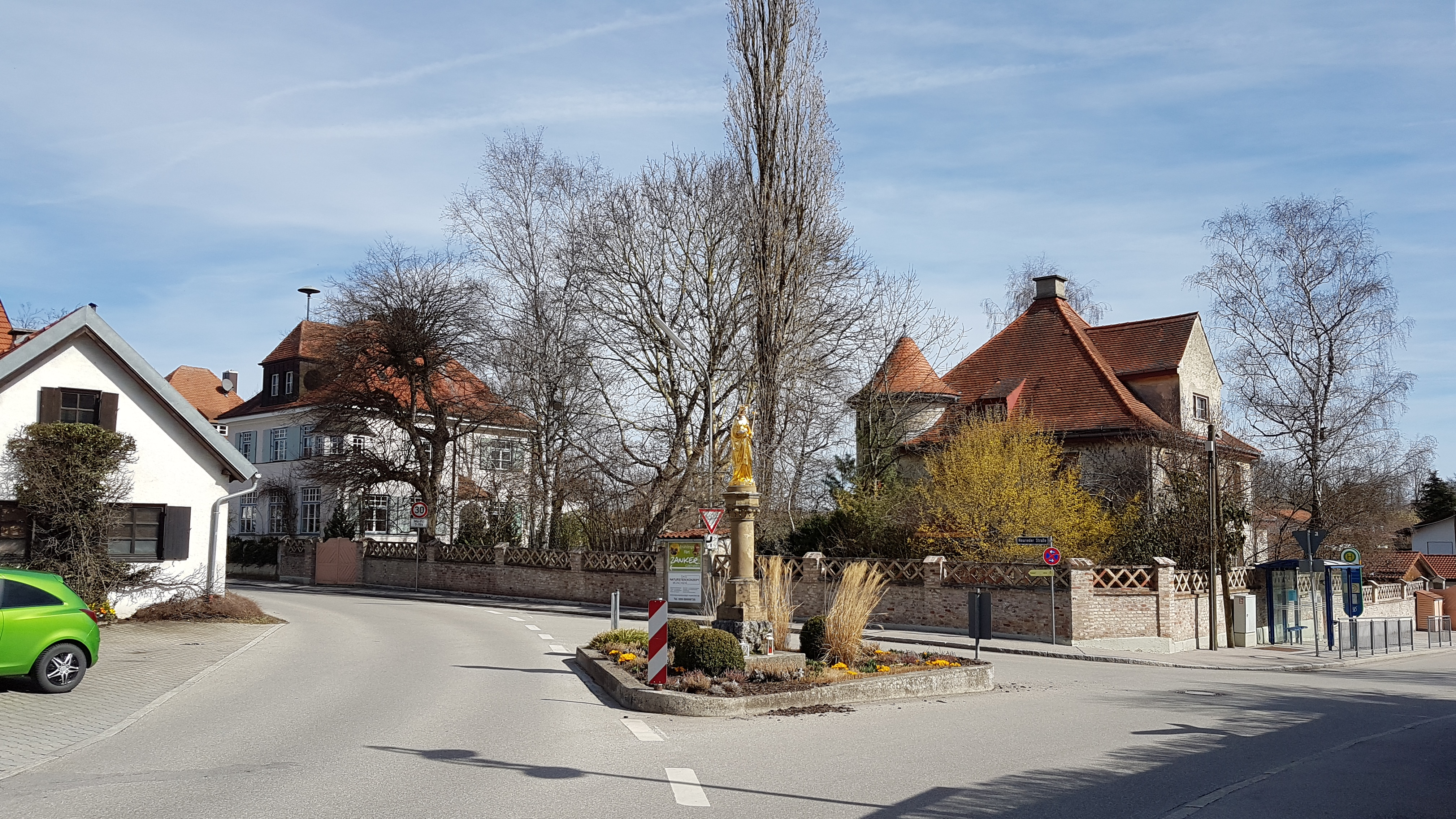 Buchendorf, Ortsmitte mit den ehemaligen Pfarramt und Schule, sowie Mariensäule.